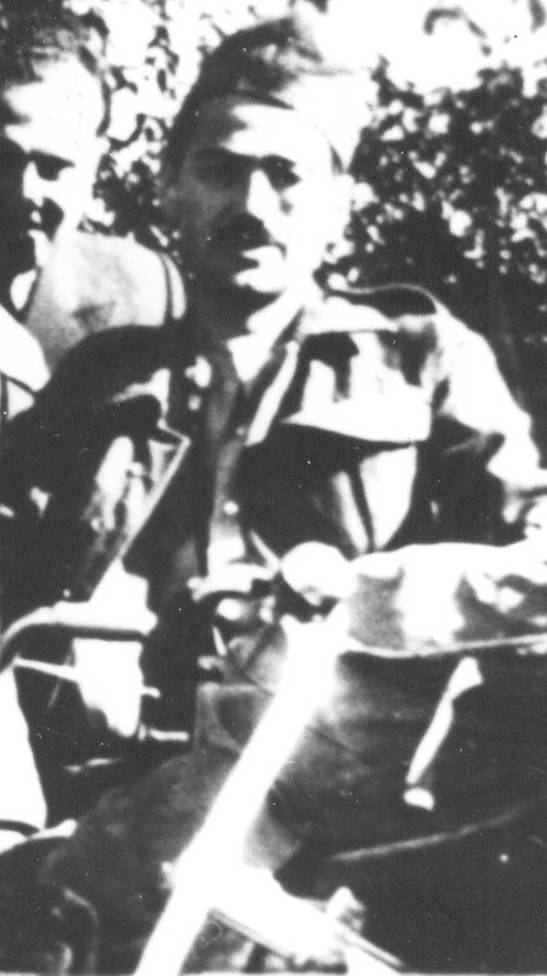 Srpskohrvatski / српскохрватски: Venko Markovski, makedonski pesnik i Hadži Lješi, komandant albanskih partizana, u okolini Debra, septembra 1943.